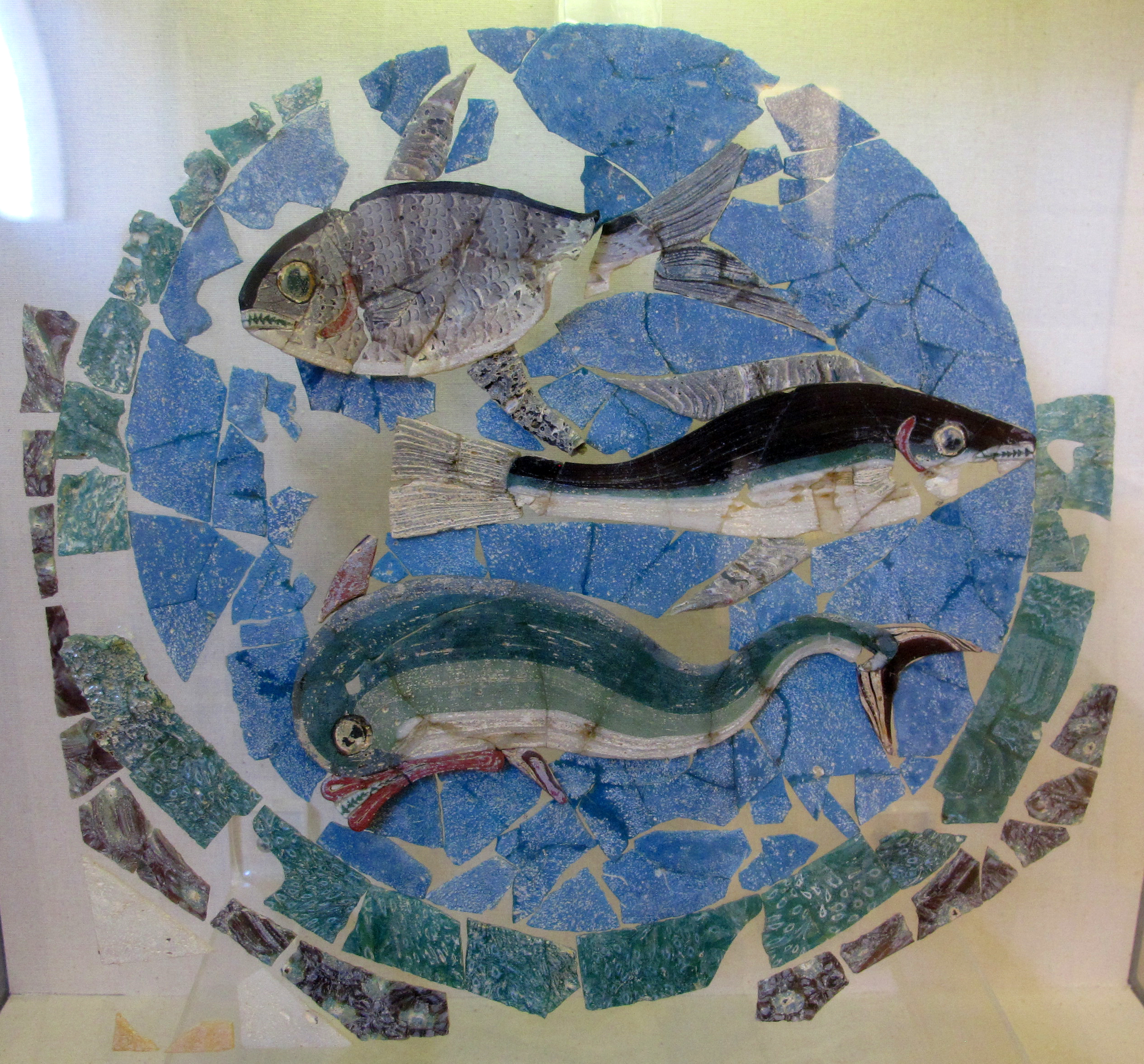 Pannello decorativo in vetro con pesci (orata, sgombro e delfino), 200-250 ca. Esposto nel Museo della città di Rimini.